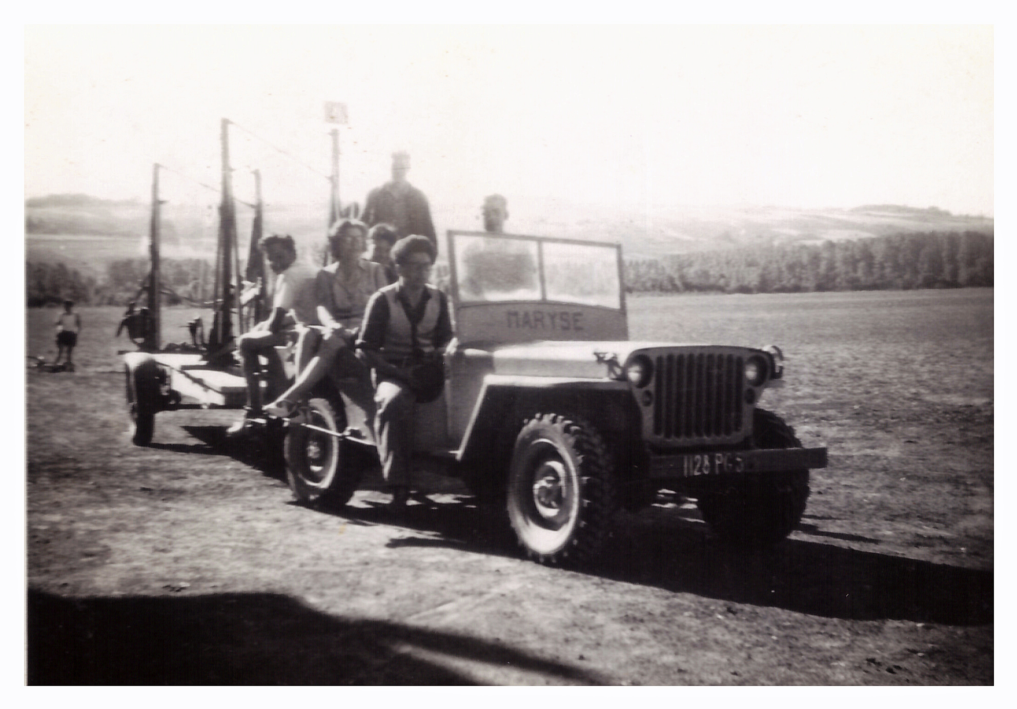 Départ pour dépanner un planeur posé aux vaches vers 1950